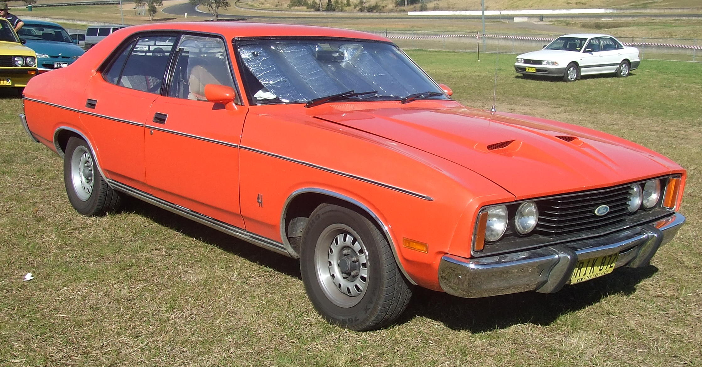 Ford Falcon XC GS